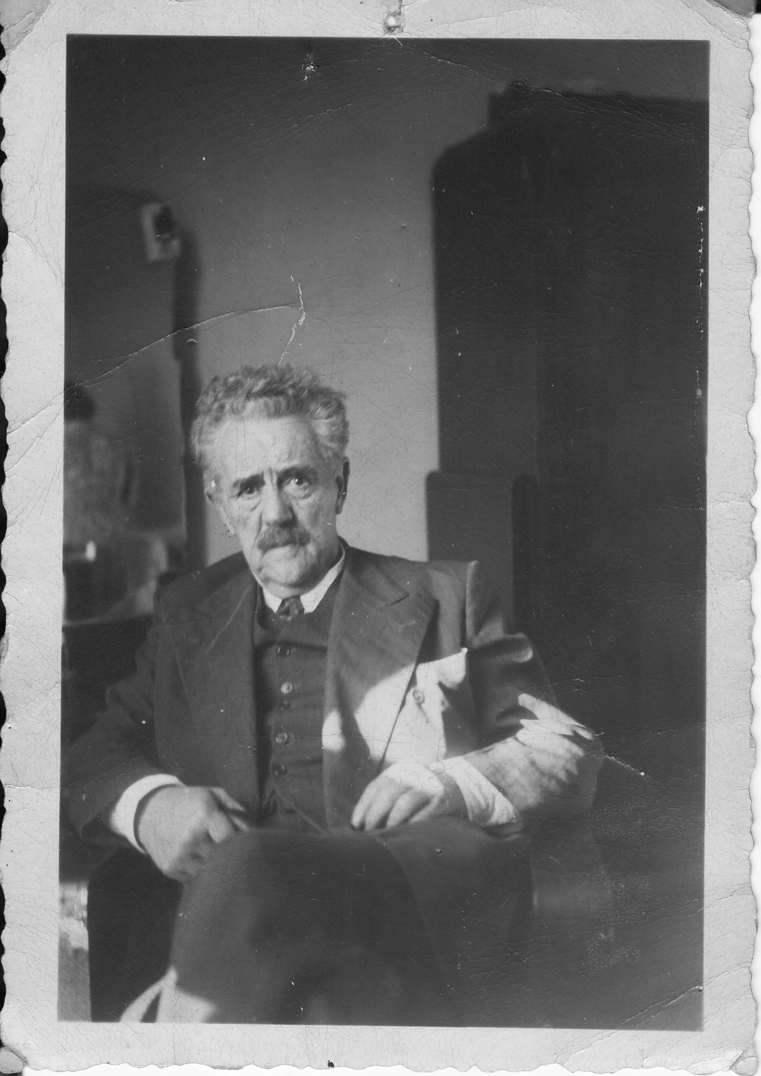 Francisco Villanueva Oñate, durante su exilio en México hacia 1940.